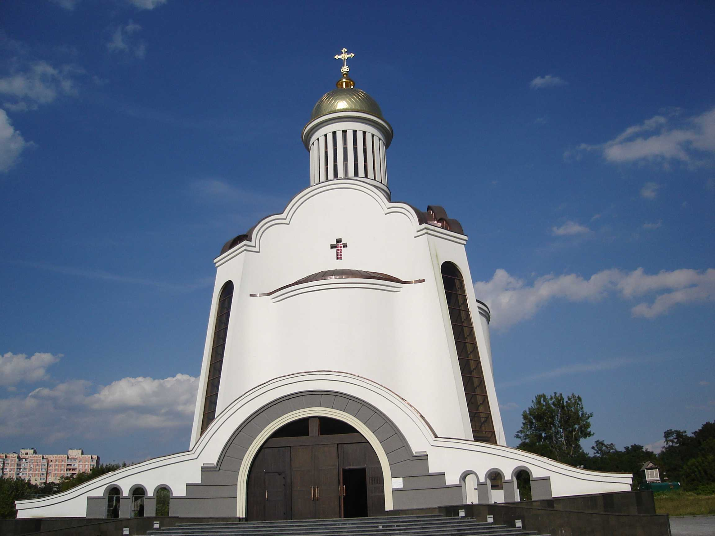 Преображенський собор на Теремках. Західний фасад